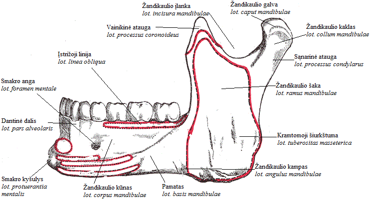 Apatinis žandikaulis